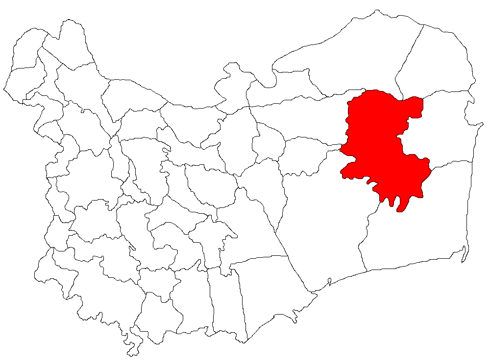 Categorie:Hărţi ale judeţului Tulcea